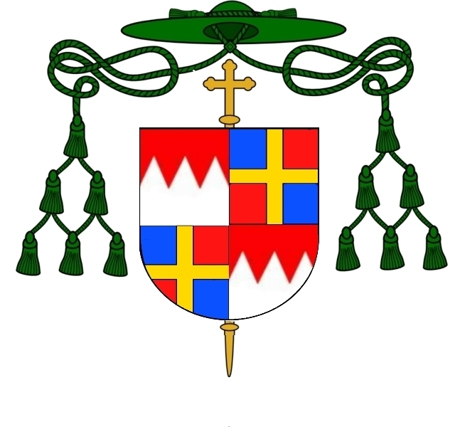 Wappen Ferdinand von Schlör 1838 - 1924, Bischof von Würzburg (1898-1924)